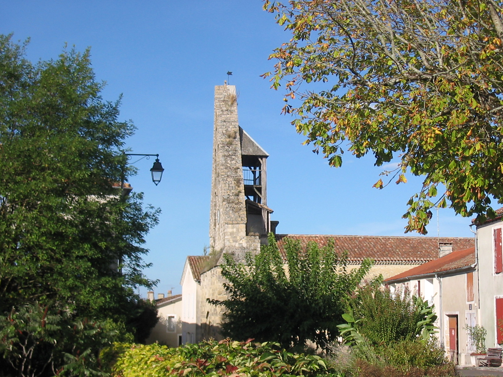 Die Kirche von Moncrabeau